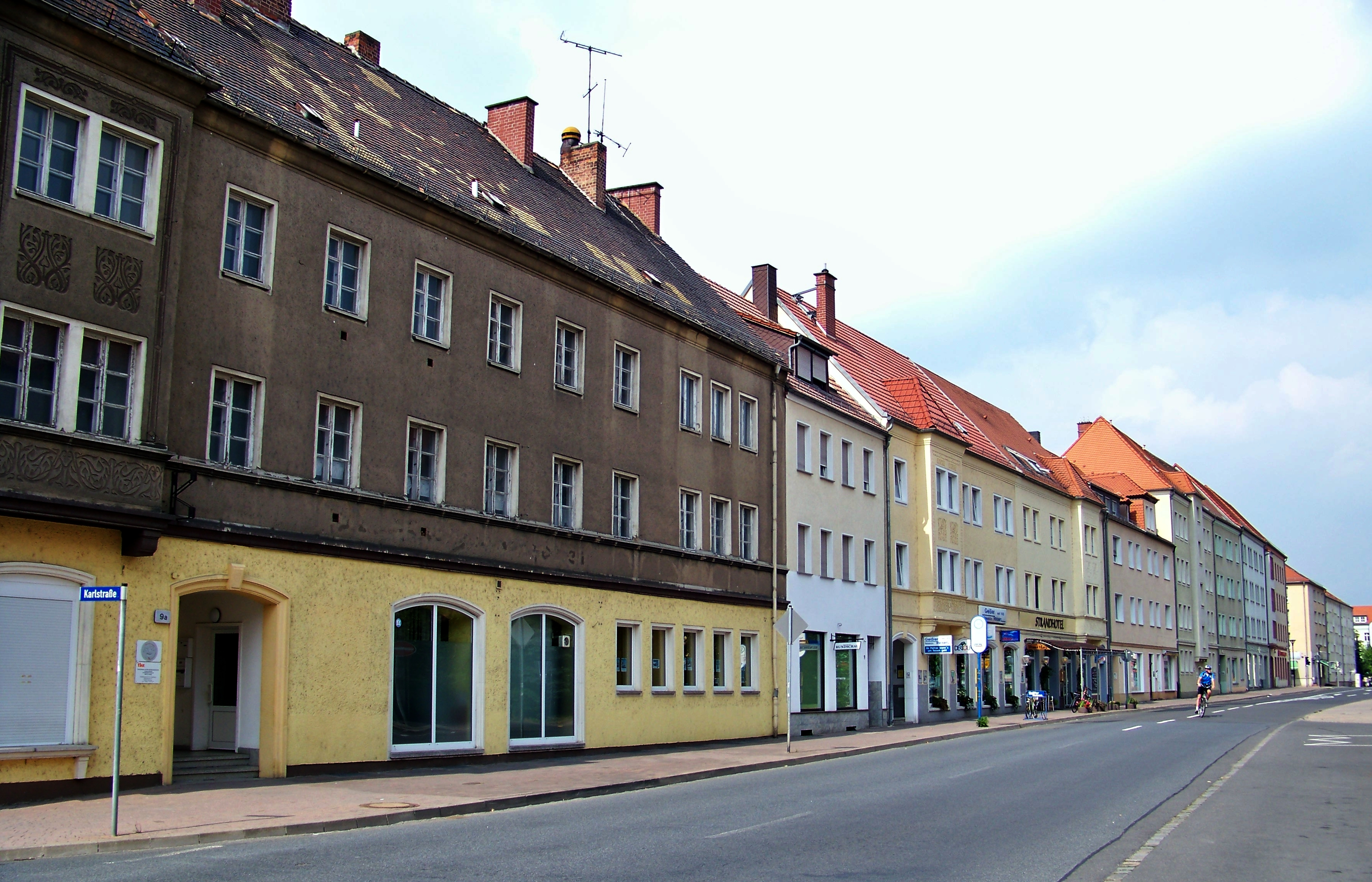 Westliche Bebauung der Rinckartstraße in Eilenburg aus den Aufbaujahren 1955-1957 nach dem 2. Weltkrieg.